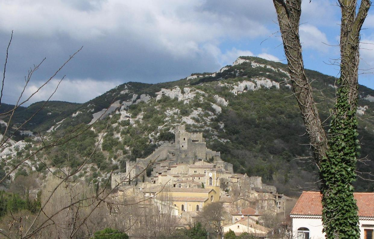 Village de Saint-Montan (Ardèche)